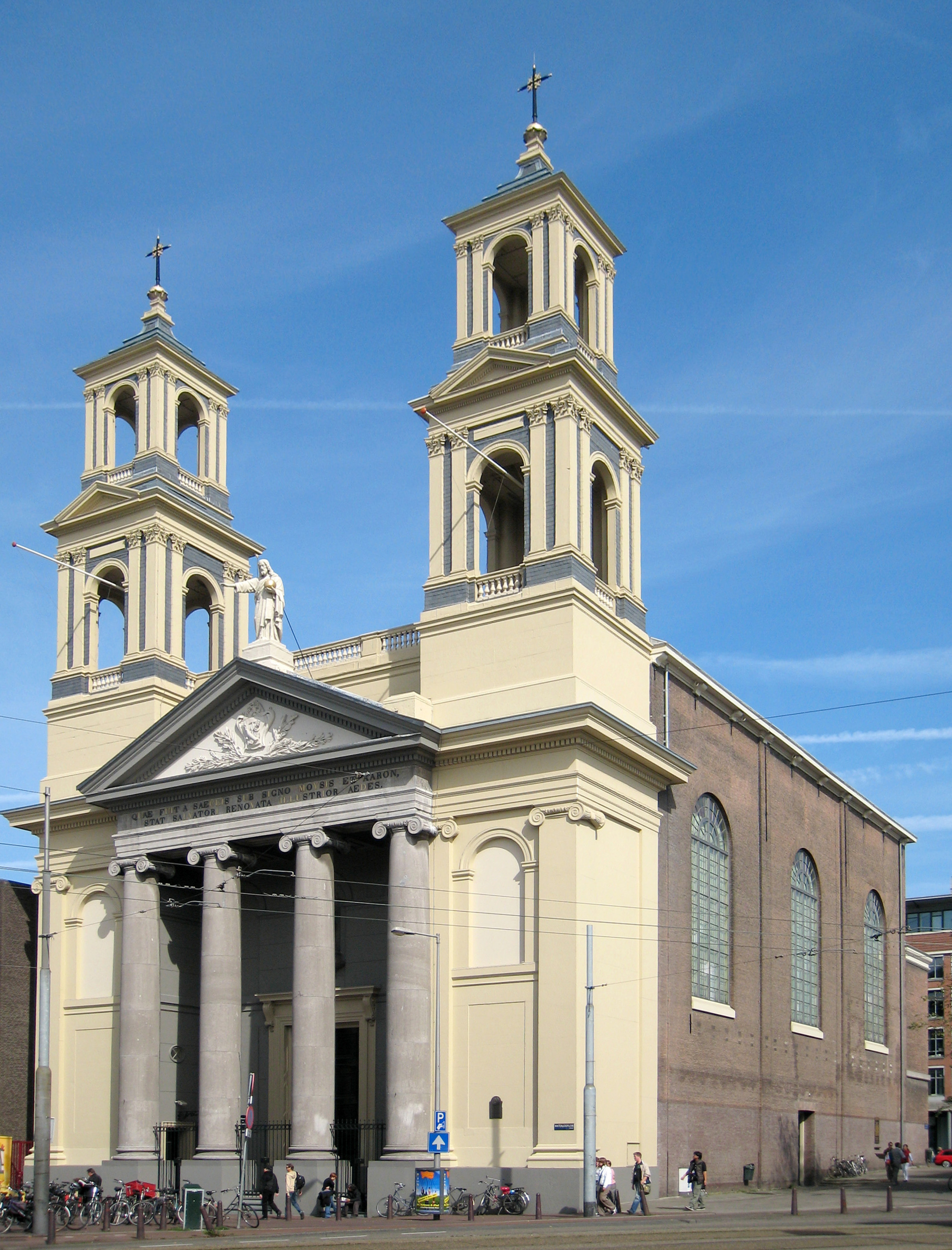 The Mozes en Aäronkerk (Mozes en Aäronchurch) in Amsterdam, Holland.